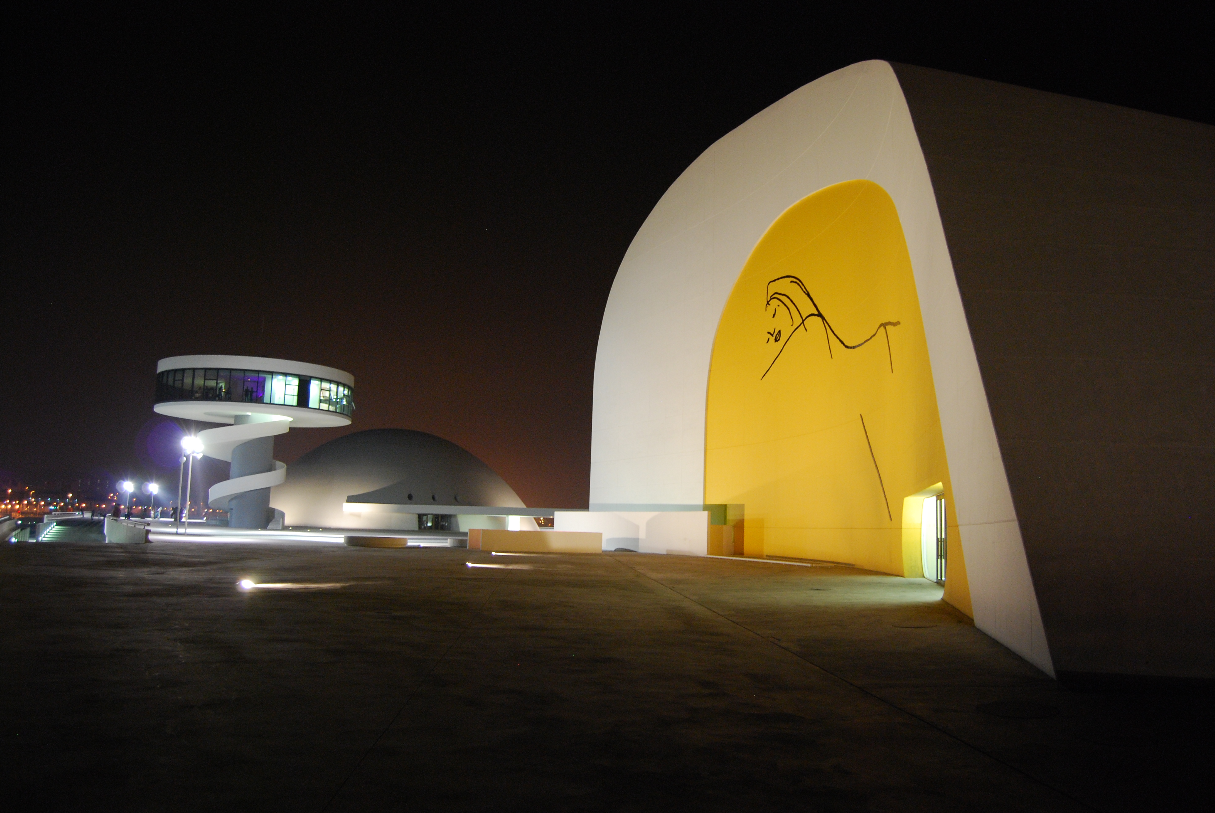 En primer plano el auditorio, platillo y al fondo la cúpula. (Avilés) Asturias.